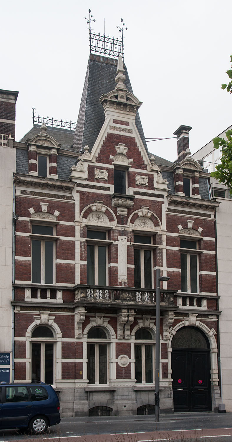 herenhuis Grote Markt 6 Sint-Niklaas